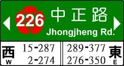 中文（台灣）: 中正路示意圖，仿台南市道路標識板，koika繪。